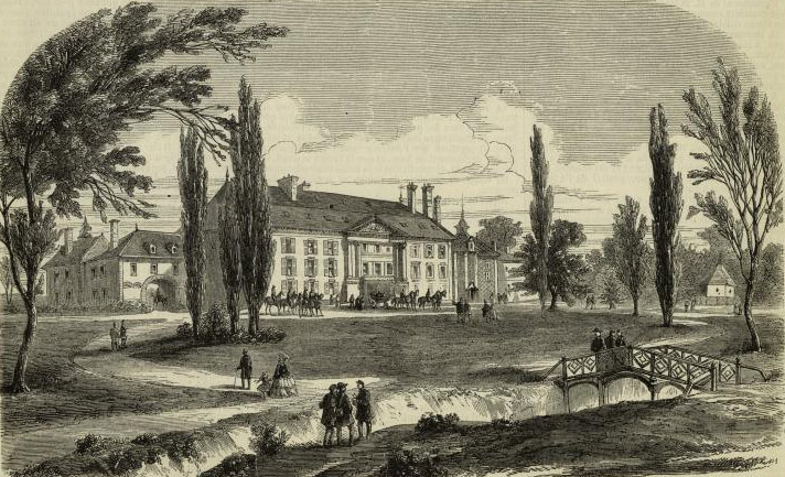 Le domaine impéri[al de] la Motte-Beuvron, en Sologne, in L'Illustration (Paris : [s.n.] 1843-1944)